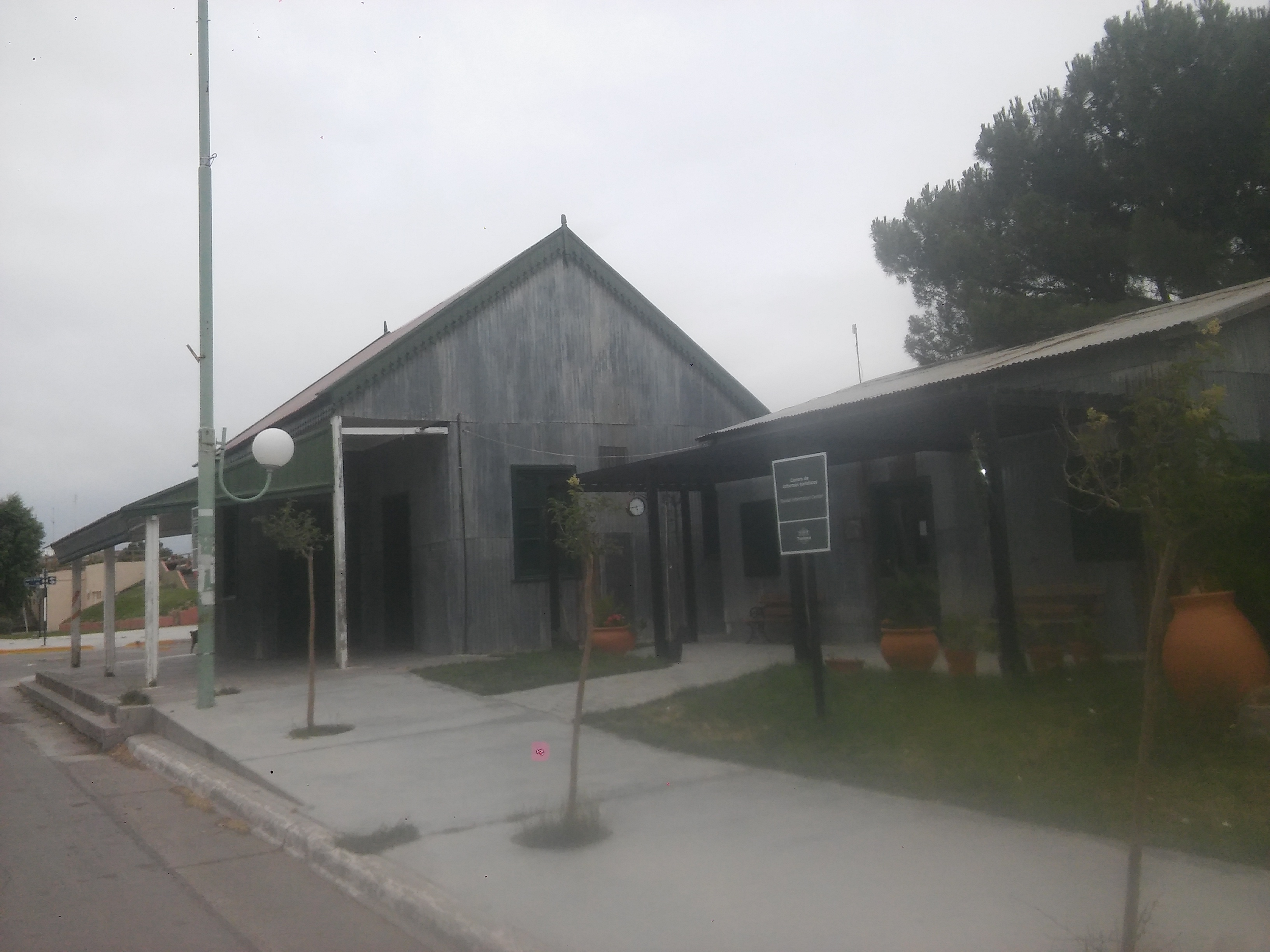 Estacion dolavon en 2018 tras una restauración